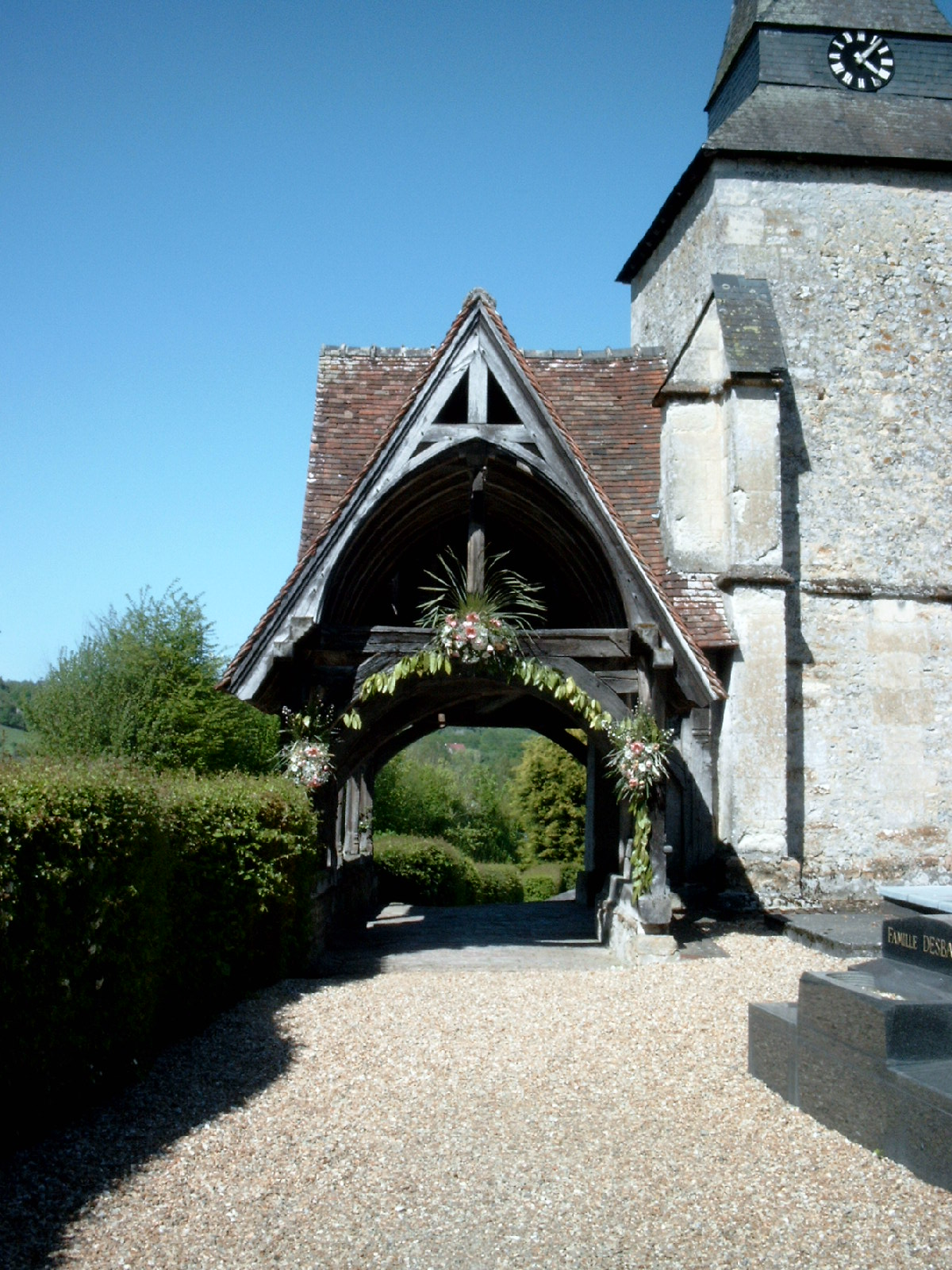 JazZz99